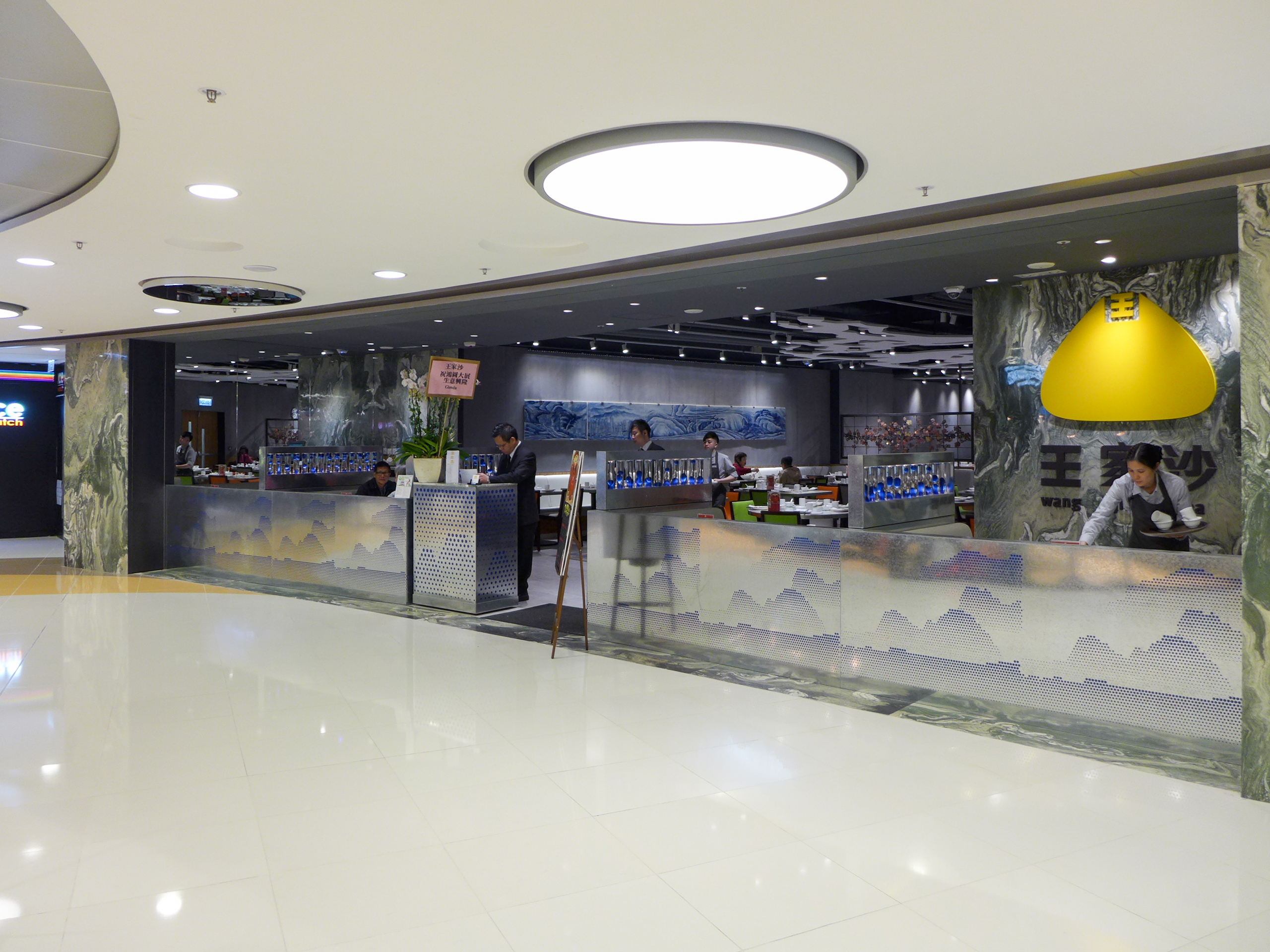 Wang Jia Sha in MOKO